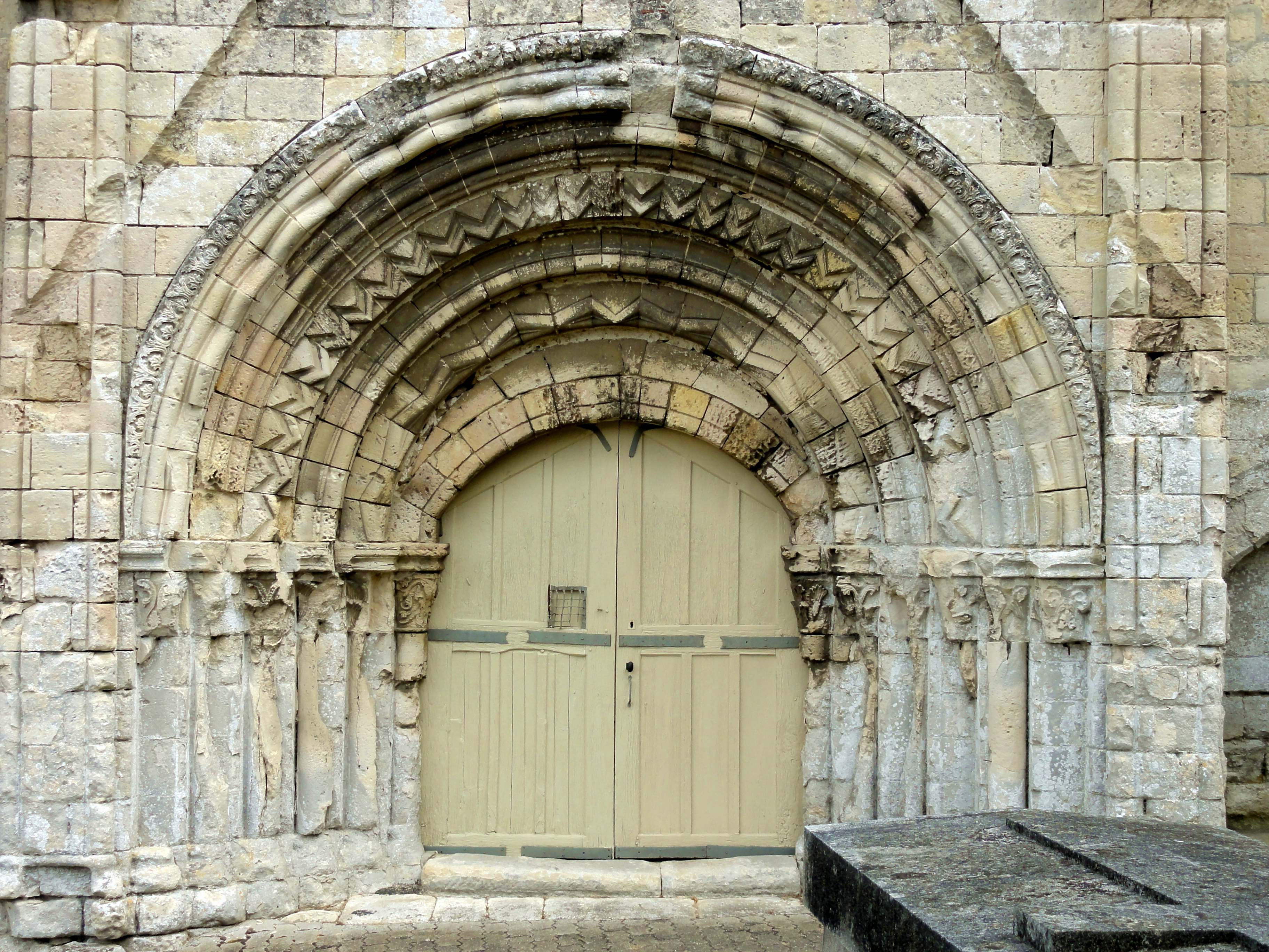 Église Saint-Michel-et-Saint-Vaast de Catenoy (voir titre).